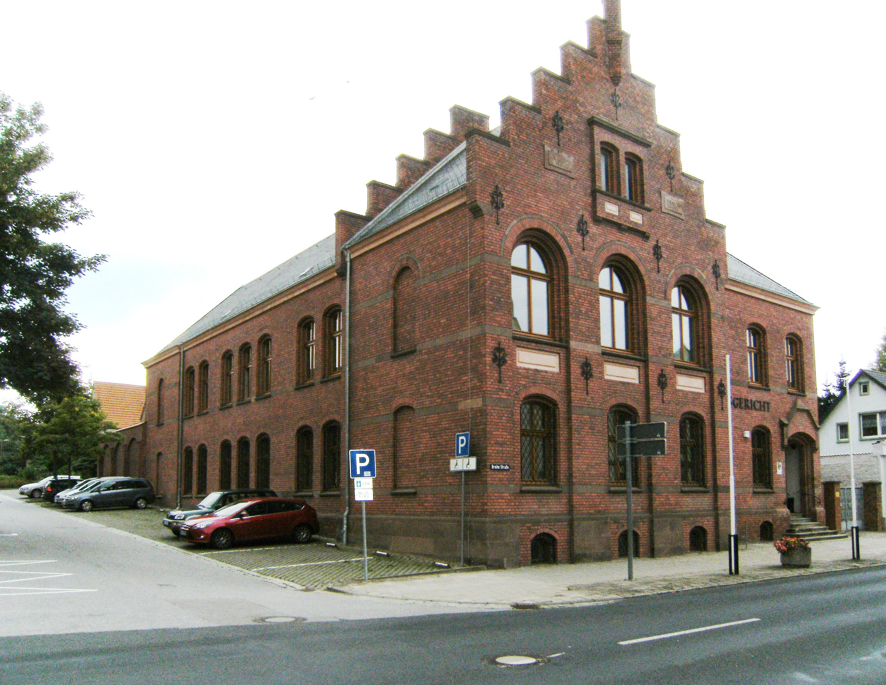 Amtsgericht Wolgast, Breite Str. 21